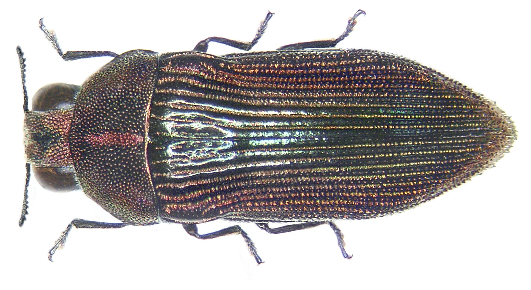 Familie: Buprestidae Grösse: 11 mm Verbreitung: Namibia Fundort: Namibia, Outjo leg. U.Schmidt, 1994; det. Mühle Foto: U.Schmidt, 2006